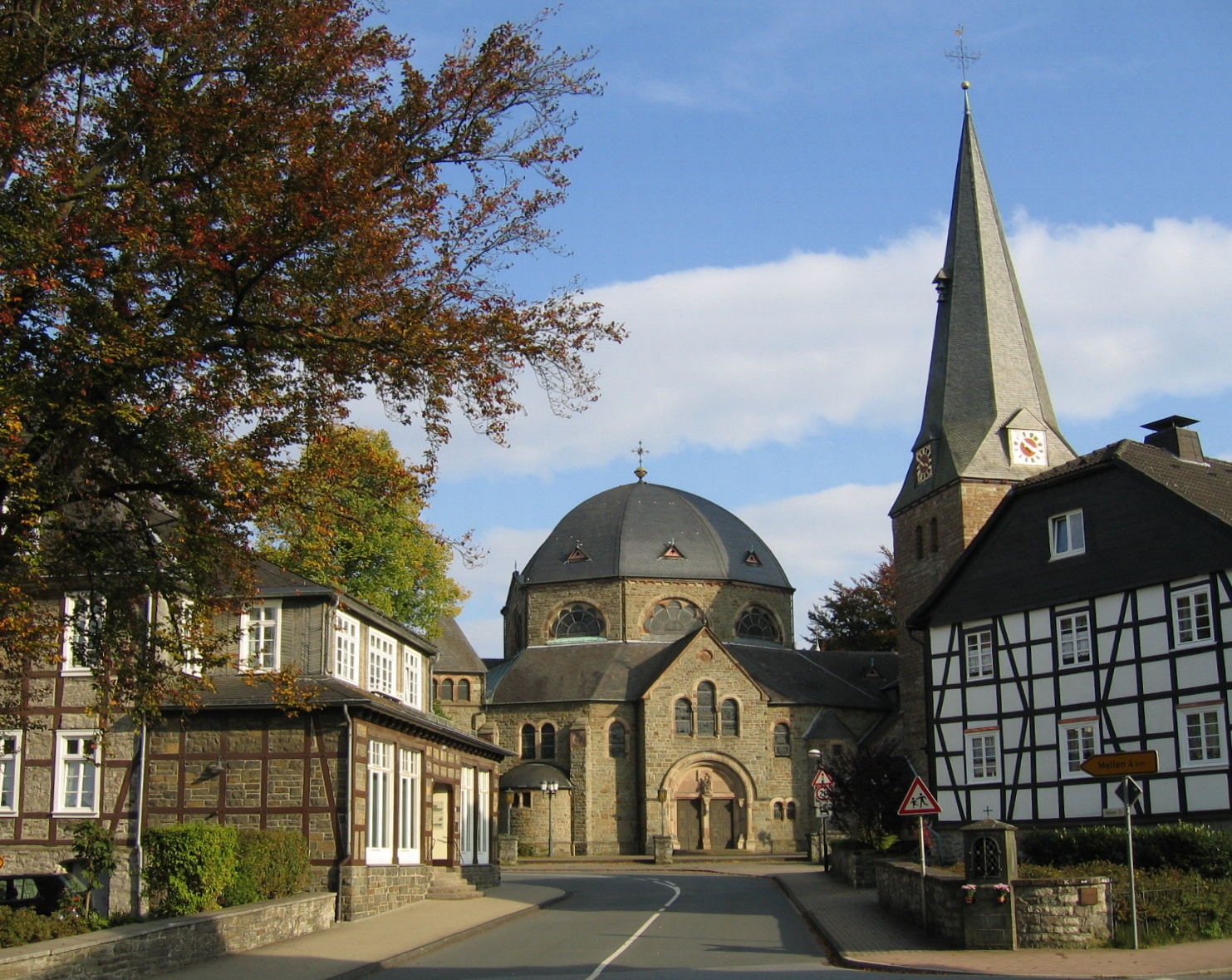 Description: Pfarrkirche St. Blasius (romanische Hallenkirche, 12./13. Jahrhundert) in Balve Source: selbst fotografiert Date: 9. Okt. 2005 Author: Bubo